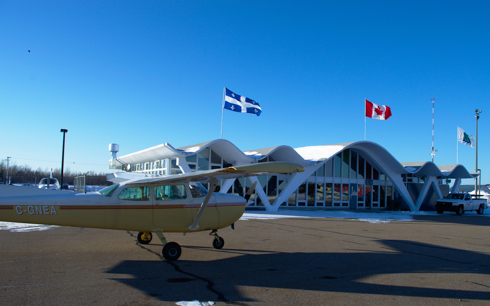 Cessna 172 à Trois-Rivières